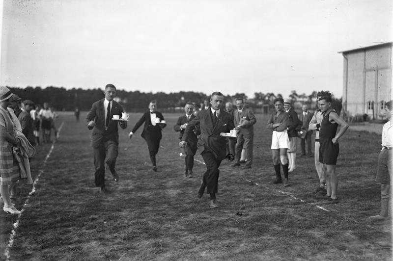 Ein origineller Wettlauf zwischen Kellnern ! Ein origineller Wettlauf zwischen Kellnern wurde in Berlin ausgetragen. Die Strecke ging über 100 m, Bedingung war, ein gefülltes Kaffe-Service unbeschädigt ans Ziel zu bringen.